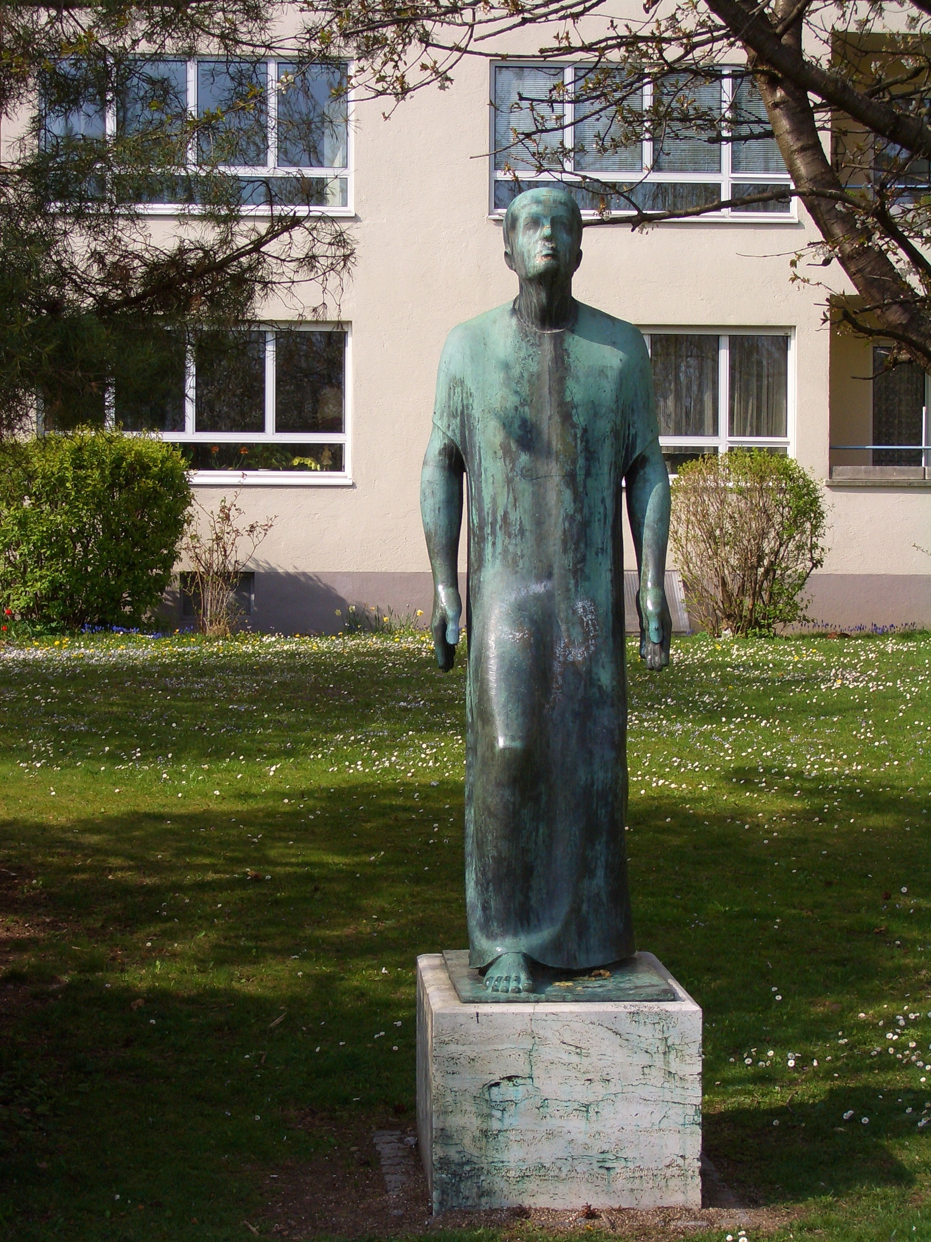 Statue von Joachim Berthold in der Siemens-Siedlung in Muenchen